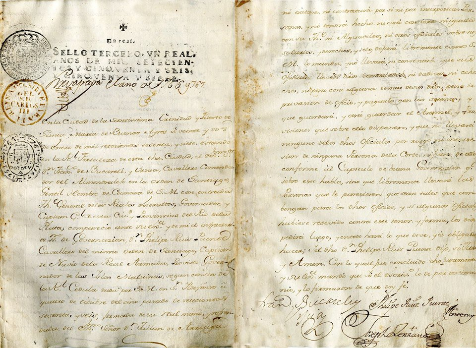 El gobernador Francisco de Paula Bucarelli comunica la Real Cédula que ordena que Felipe Ruiz Puente se dirija a las Islas Malvinas en las fragatas “Liebre” y “Esmeralda”, a fin de asumir su gobernación. Buenos Aires, 22 de enero de 1767. Sala IX. Legajo 8-10-3.